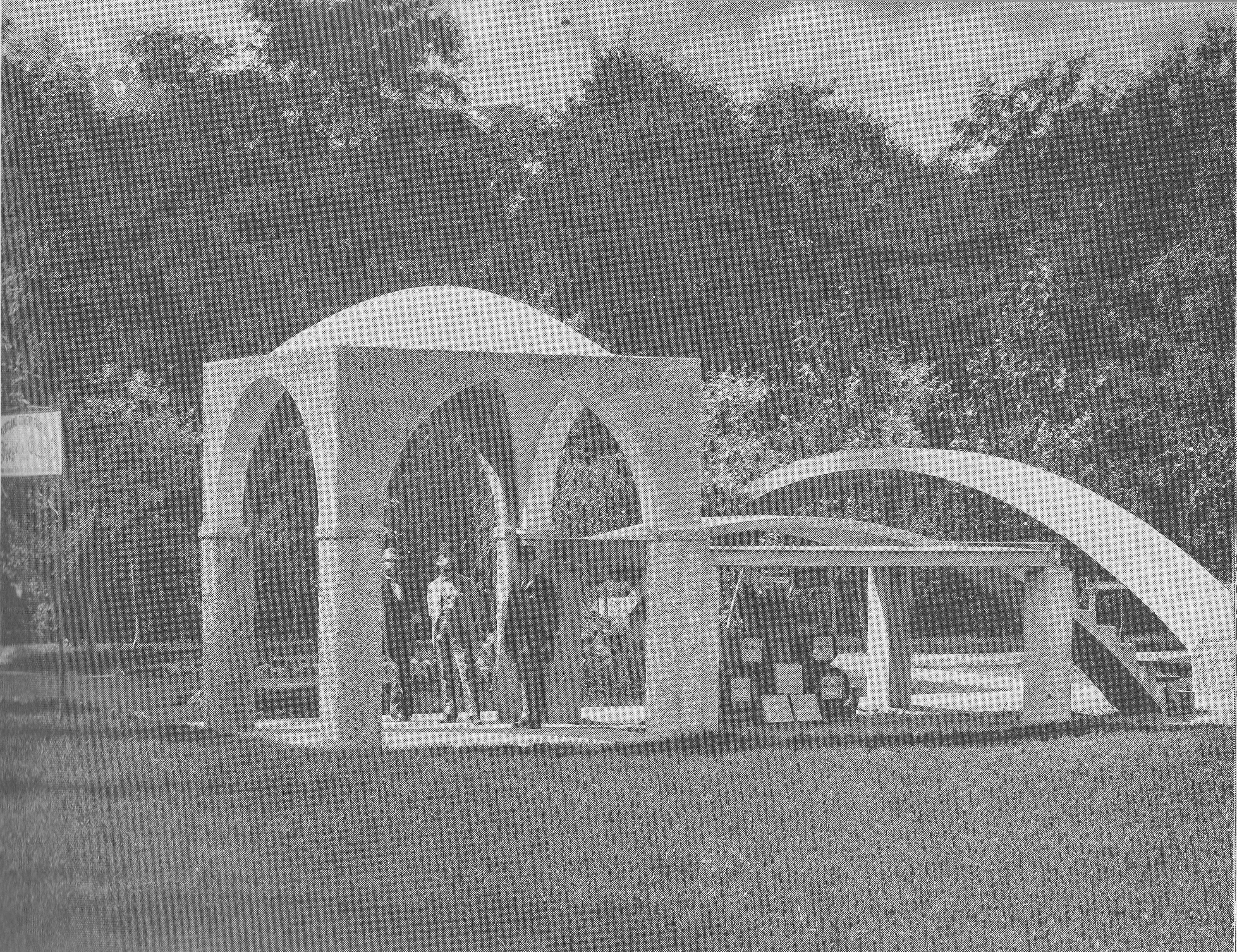 Hessische Landes-Gewerbe-Ausstellung zu Offenbach am Main, Betonobjekte 1879